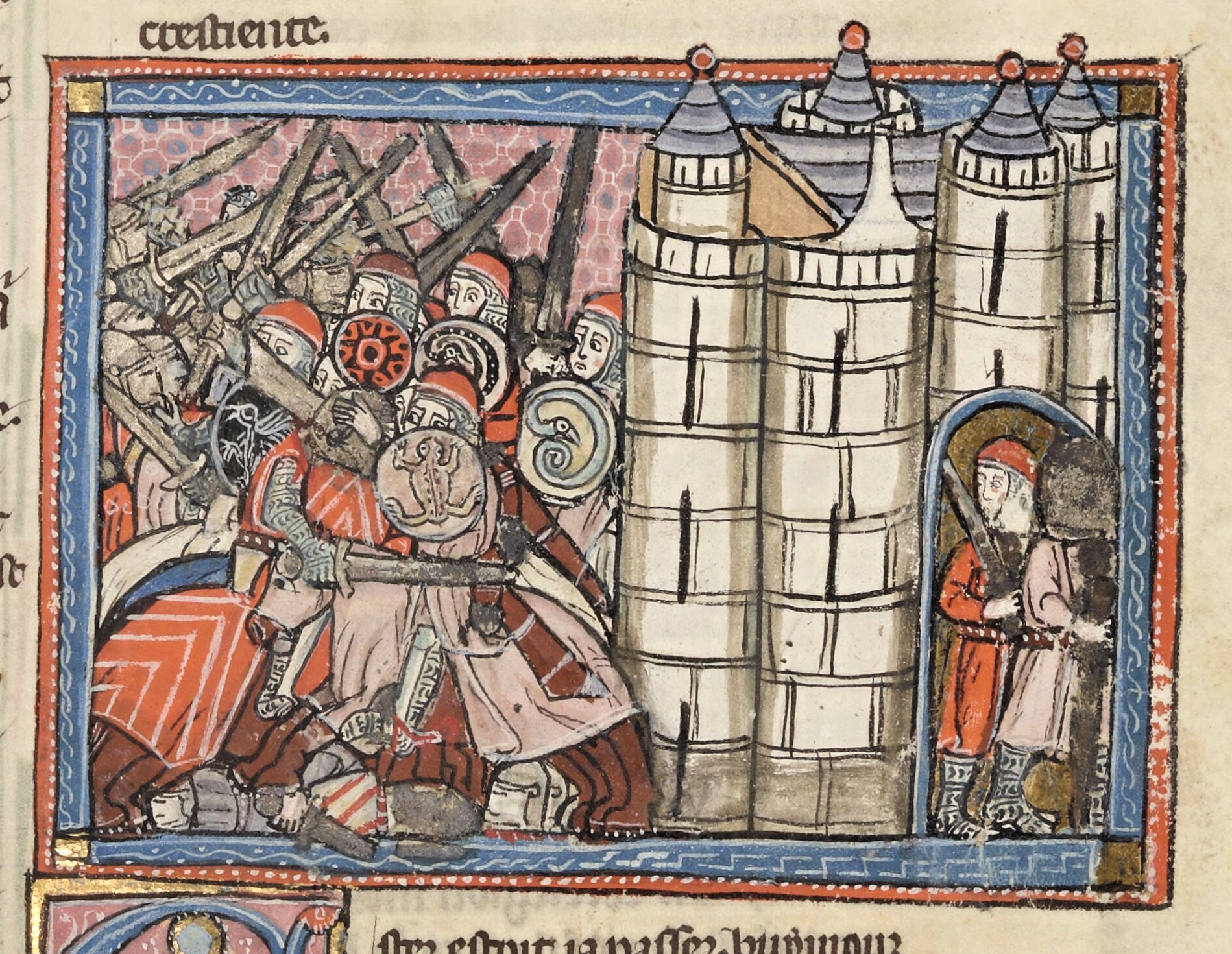 Bataille de Ramla (1105)